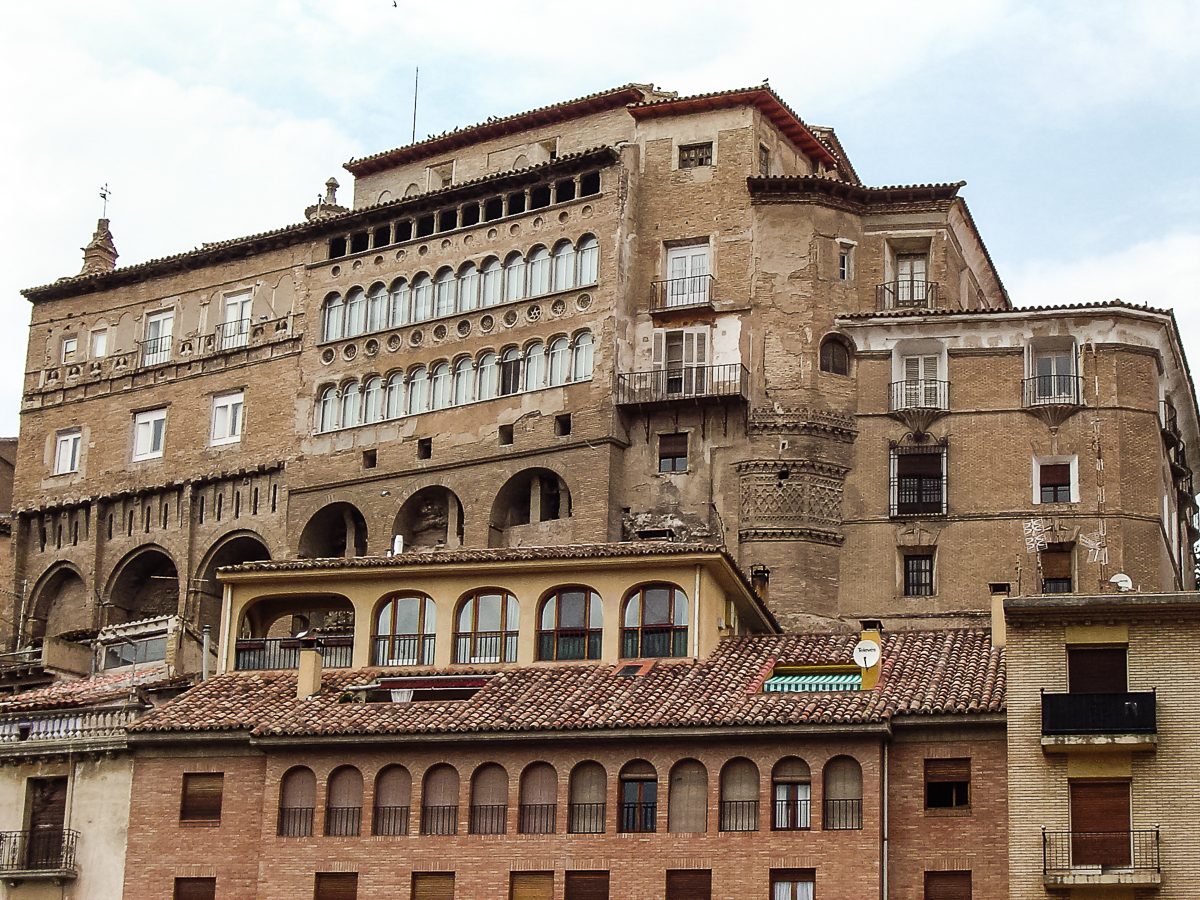 Tarazona 00007.jpg